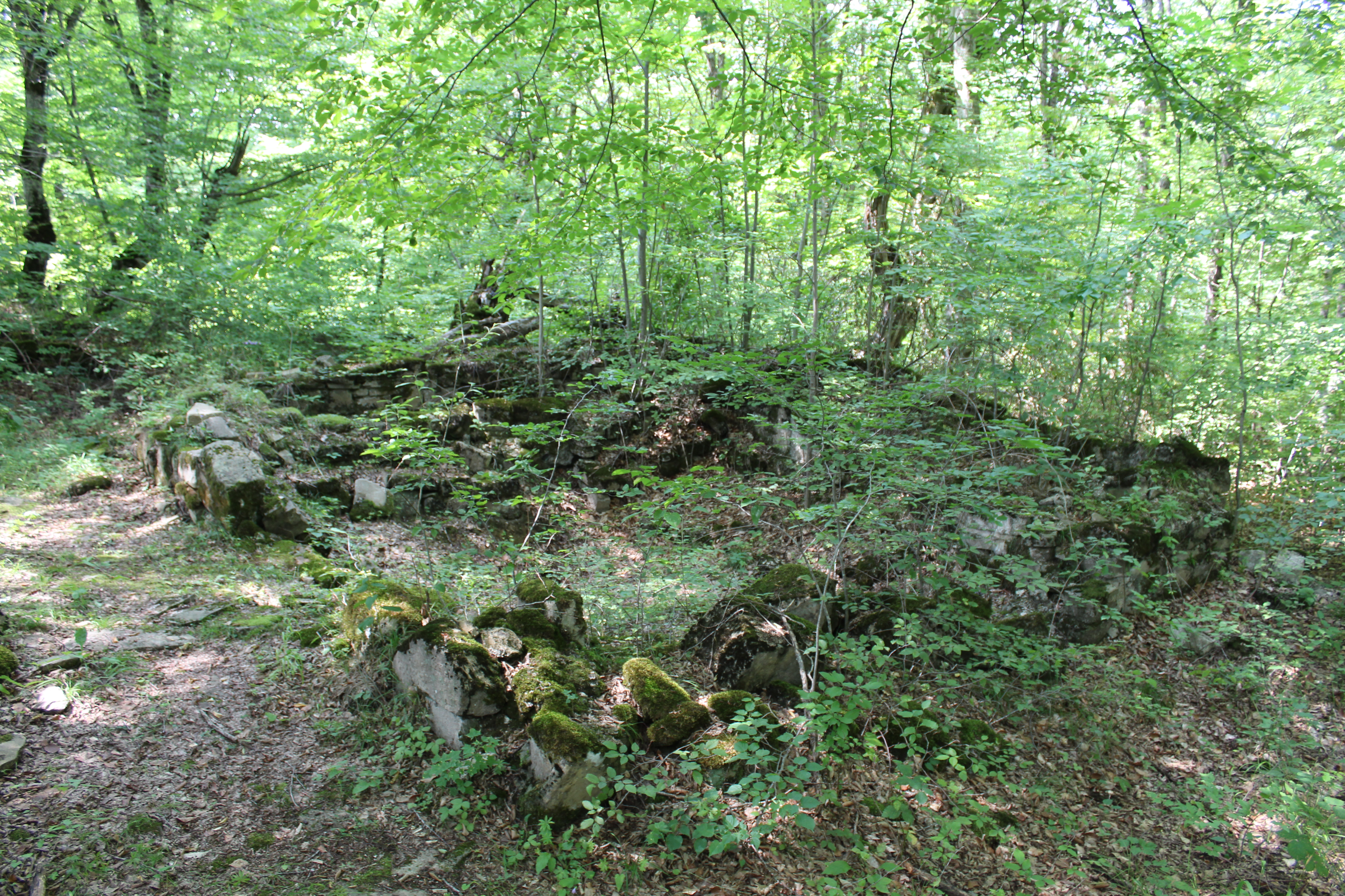 ჭერემის ციხის მარანი